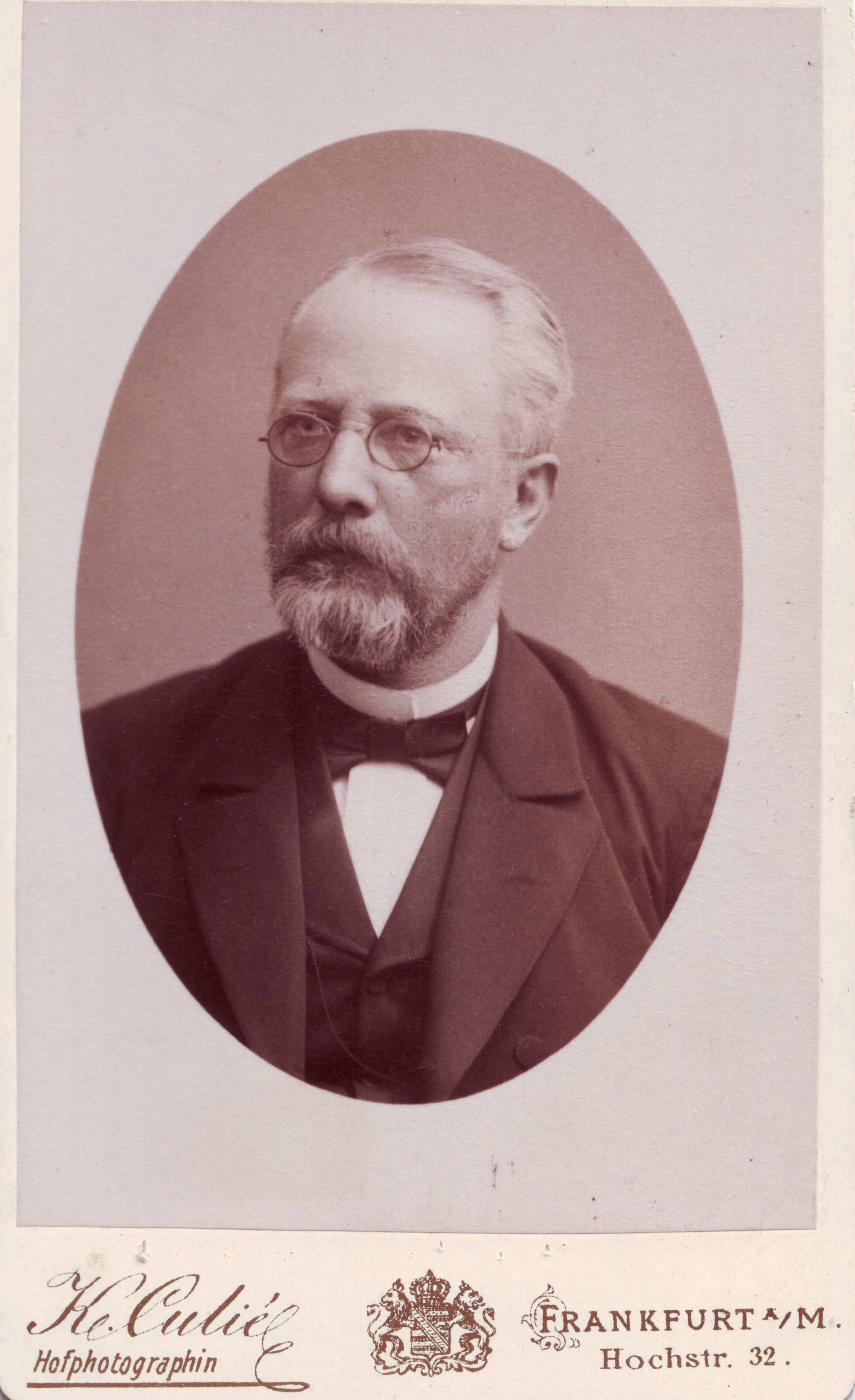 Heinrich Velde im Alter von 63 Jahren